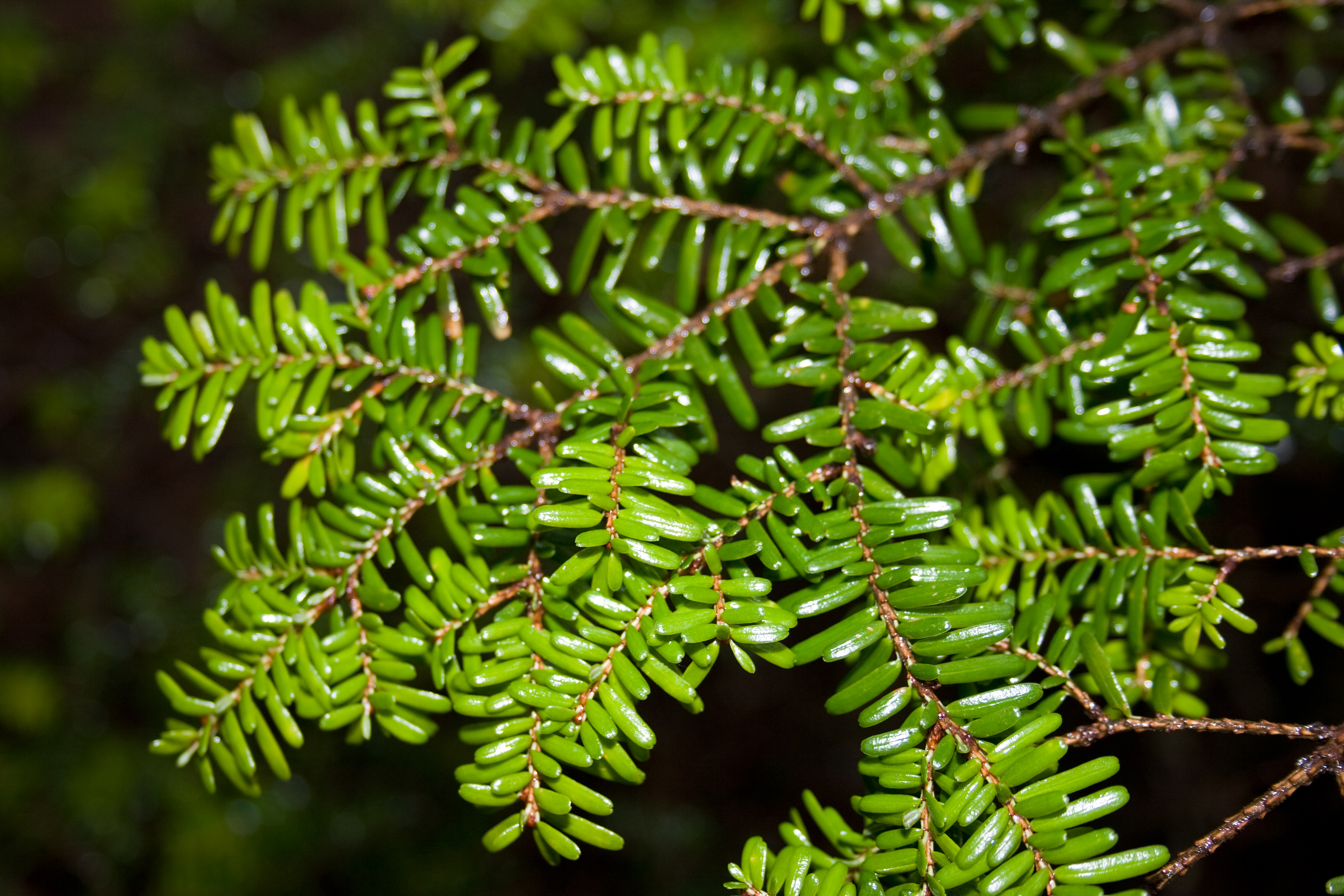 コメツガ (学名:Tsuga diversifolia)